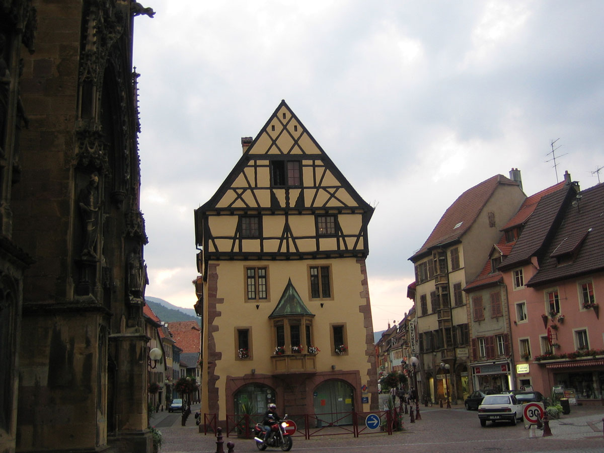 Stadtkern von Thann